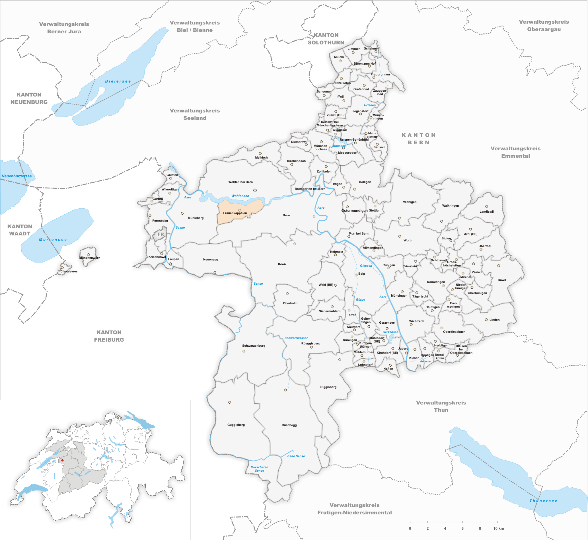 Municipality Frauenkappelen